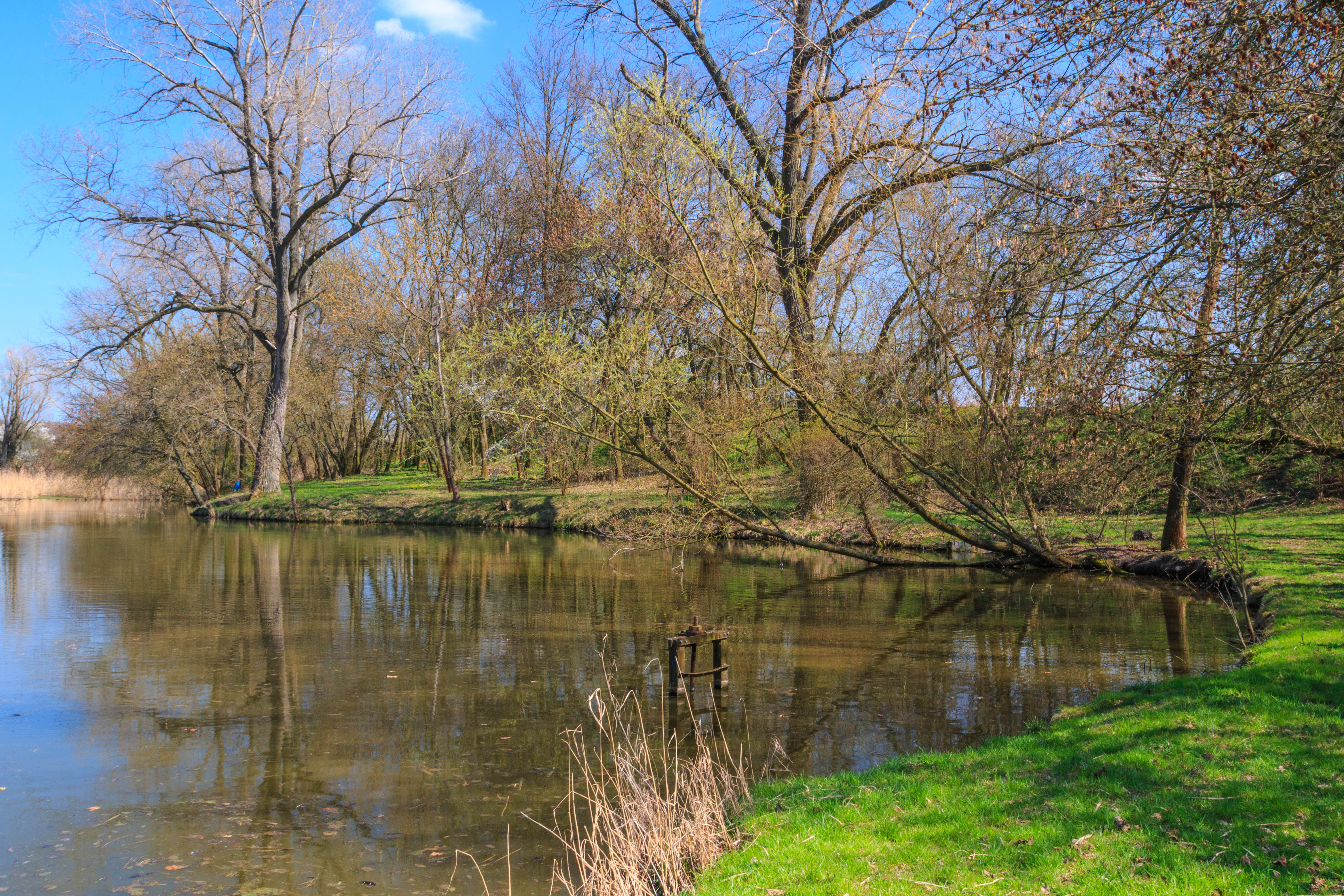 Starý rybník pod Vyšehněvicemi Project: Vodstvo.